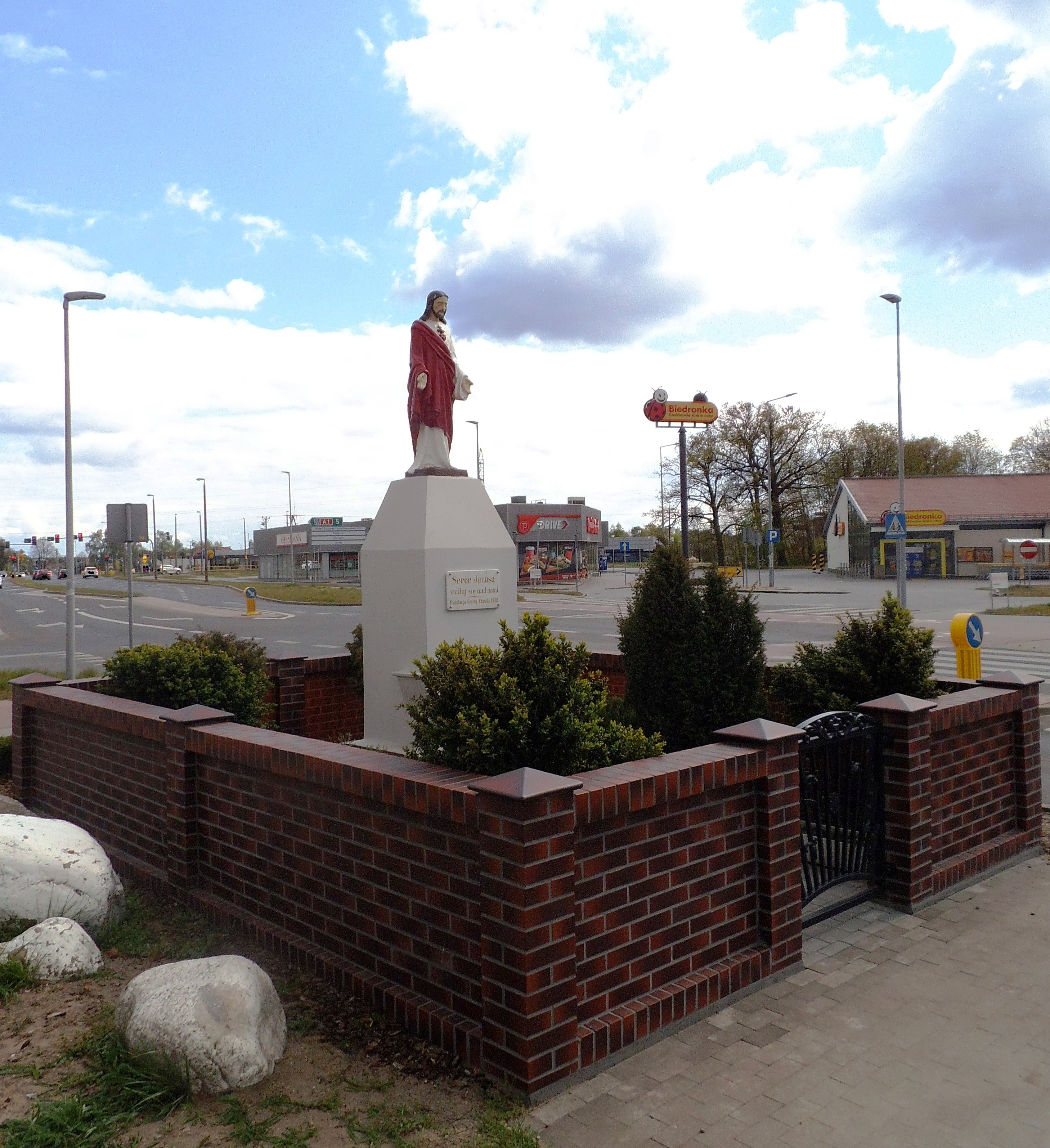 Pomnik Serca Jezusa w Toruniu, 2020